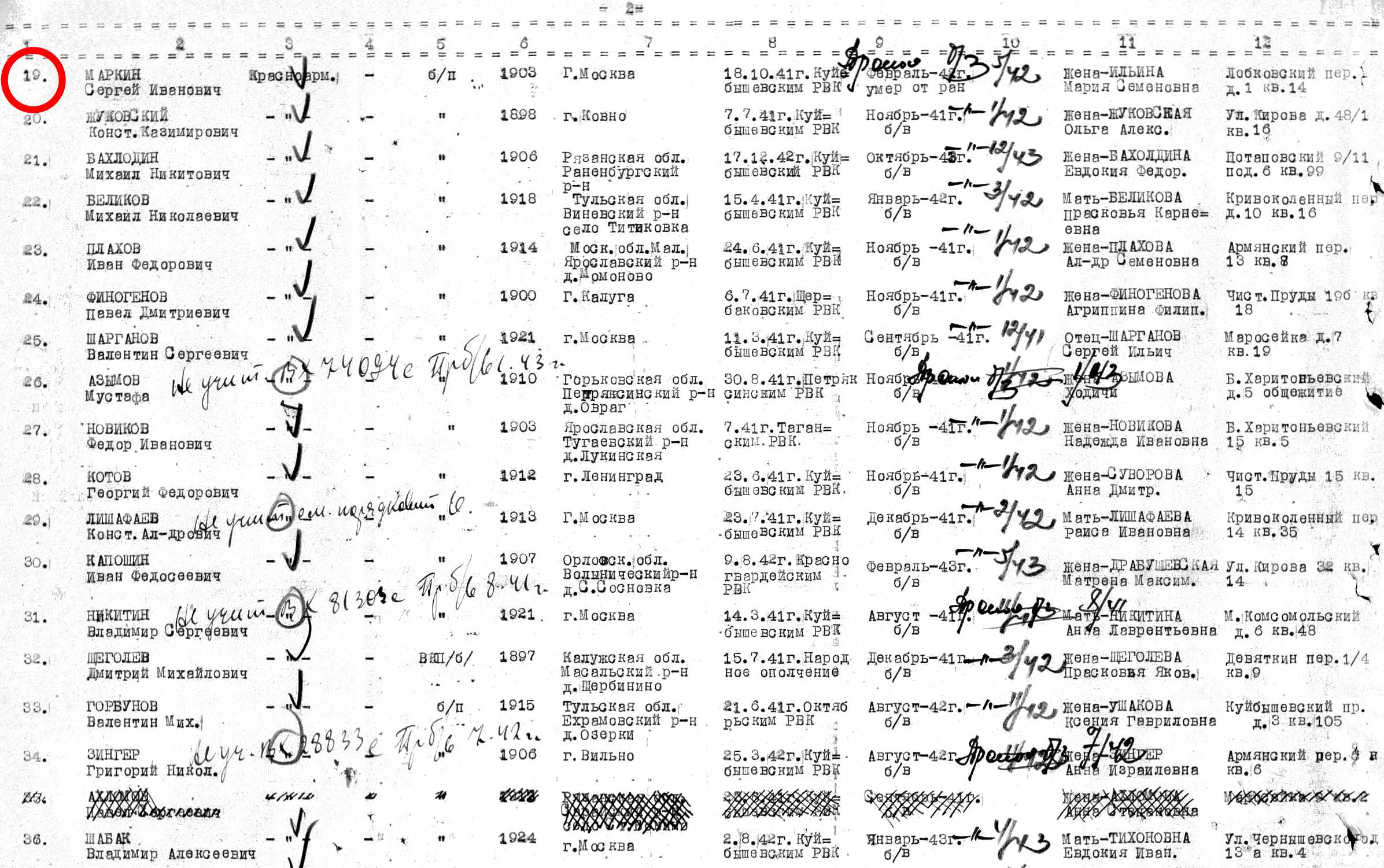 Документ, уточняющий потери Номер донесения 83863 Тип донесения Донесения послевоенного периода Дата донесения 09.10.1946 Название части Куйбышевский РВК г. Москвы